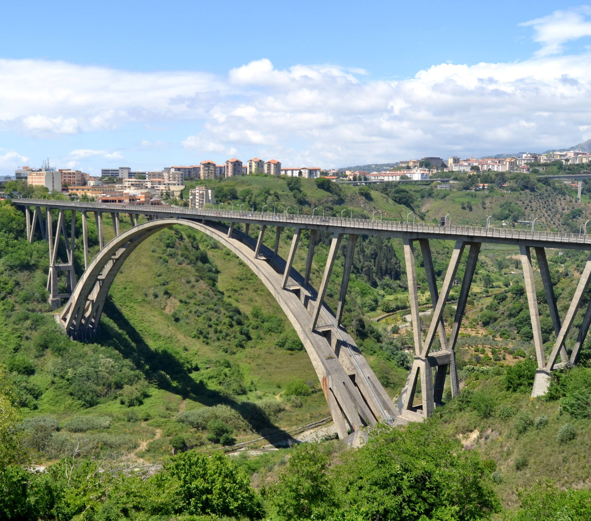 Viadotto Bisantis